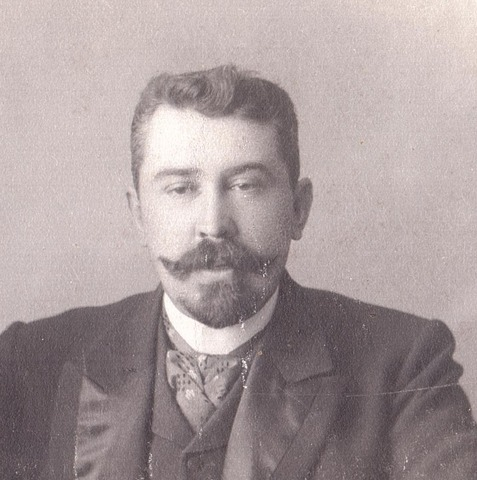 Пётр Карлович Гран (18 ноября 1869 — 1941, Бухарест) — российский государственный деятель, иркутский и томский губернатор.